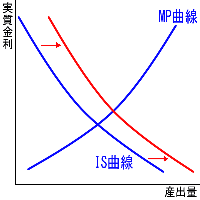 IS曲線が右にシフトするの図